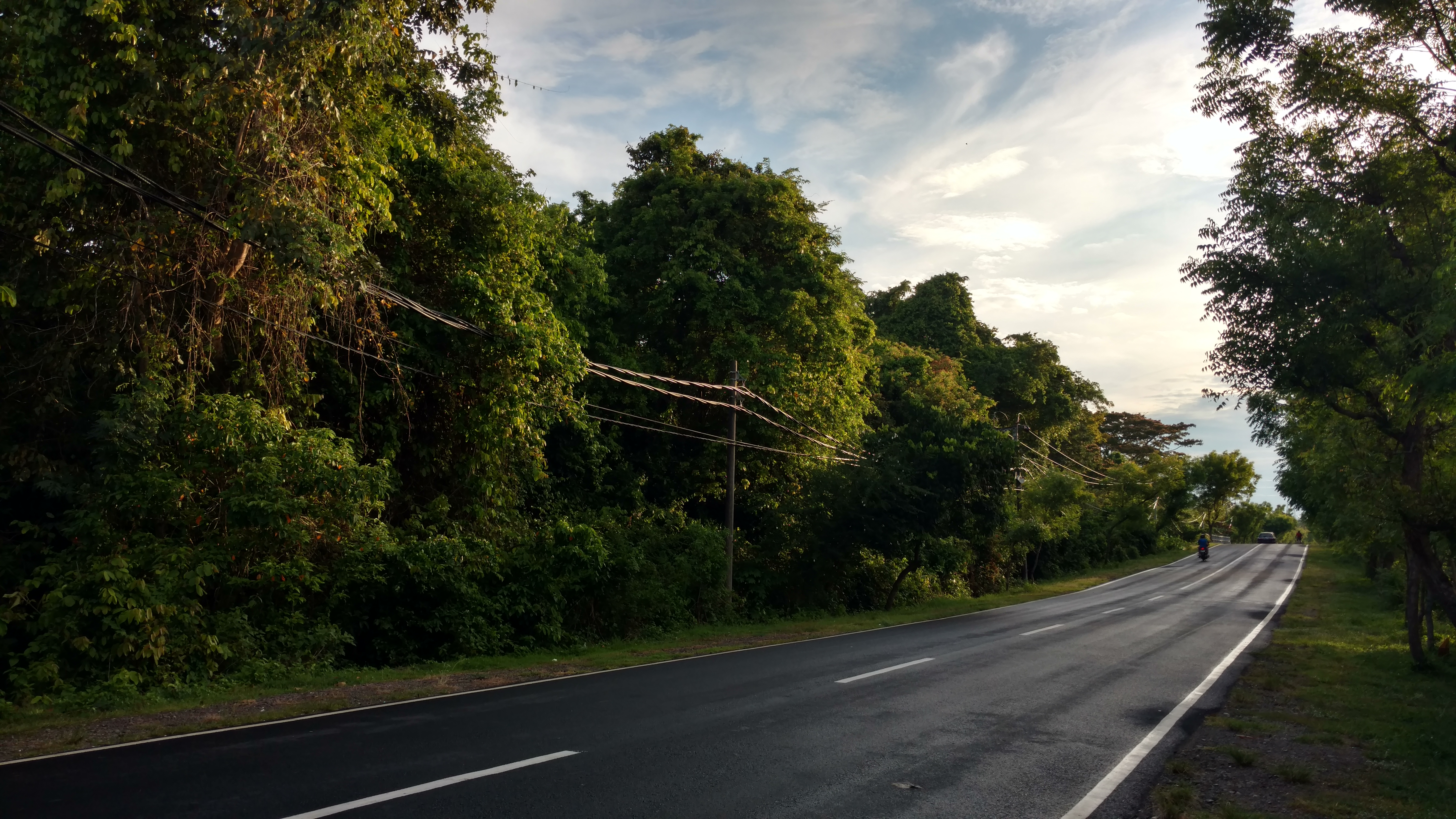 Route dans le nord ouest de l’île de Bali.